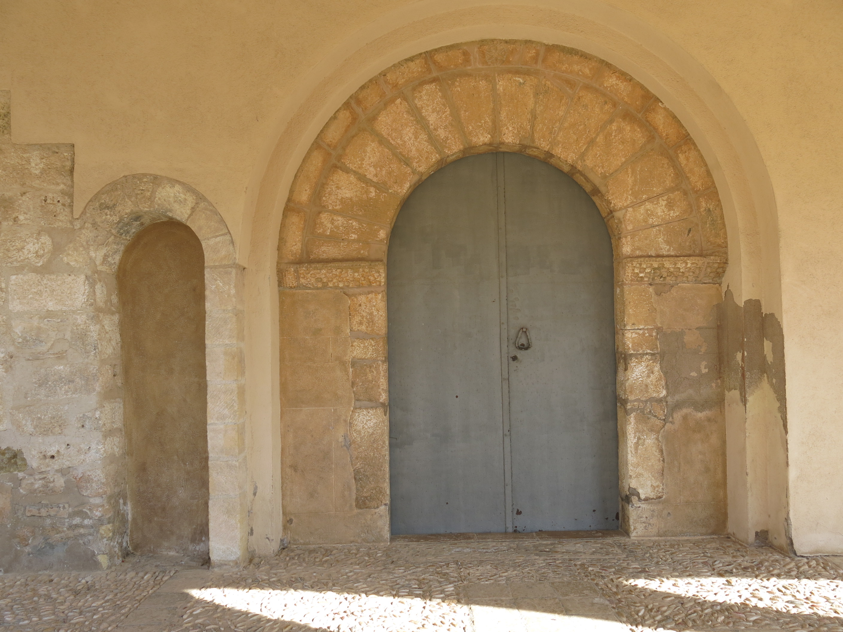 Església parroquial de Santa Maria (Salomó)